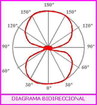 Esquema bidireccional.